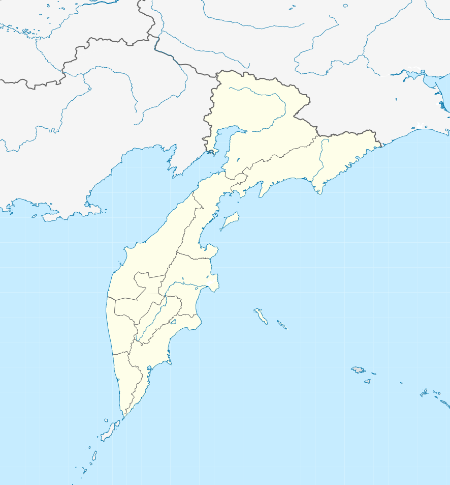 Административная карта Камчатского края (Россия). Координаты для GMT: -R148.26/179.26/48.27/67.73 Инструменты: GMT, Inkscape